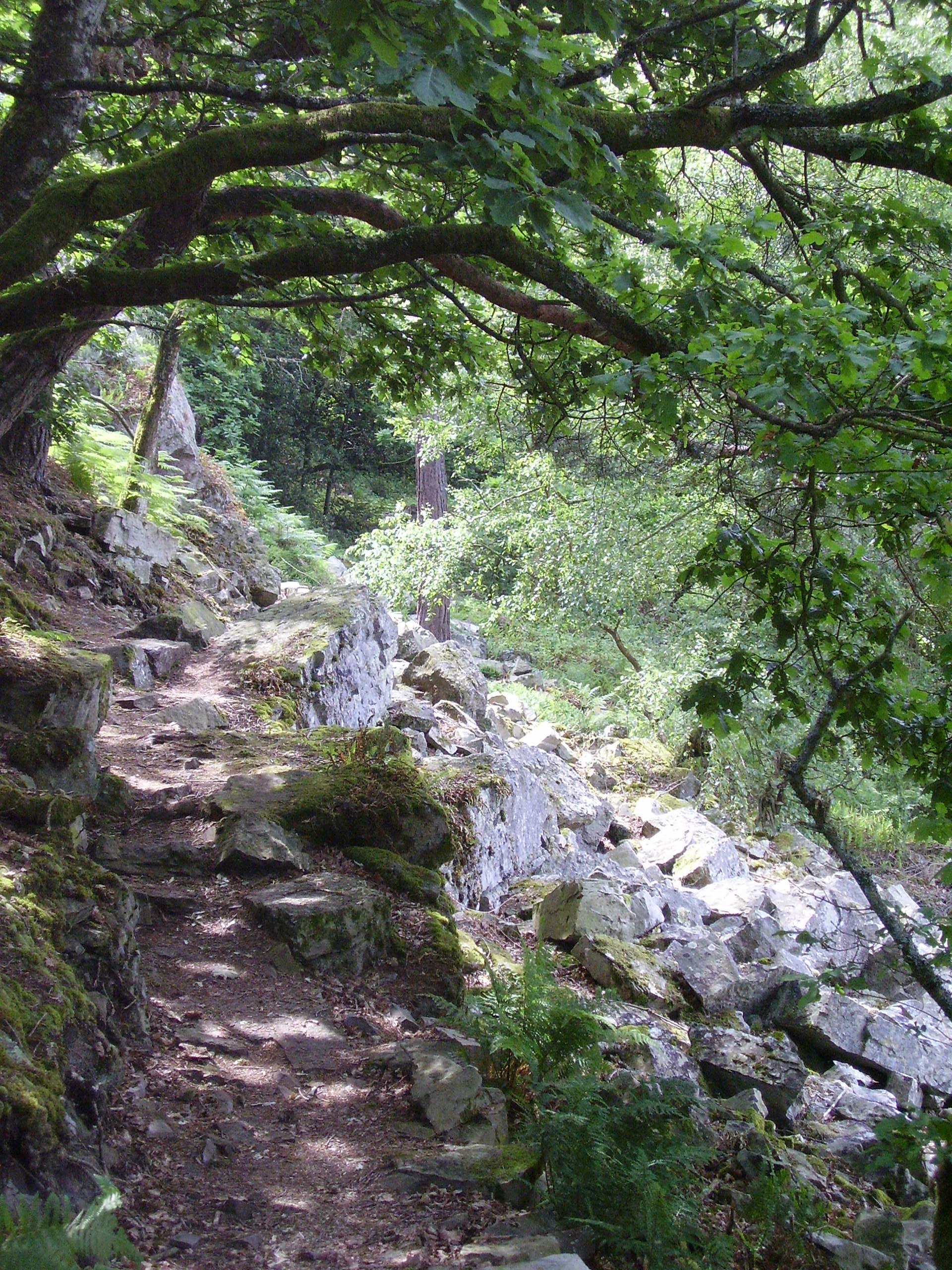 Les Gorges de Villiers dans le Parc naturel régional Normandie-Maine.